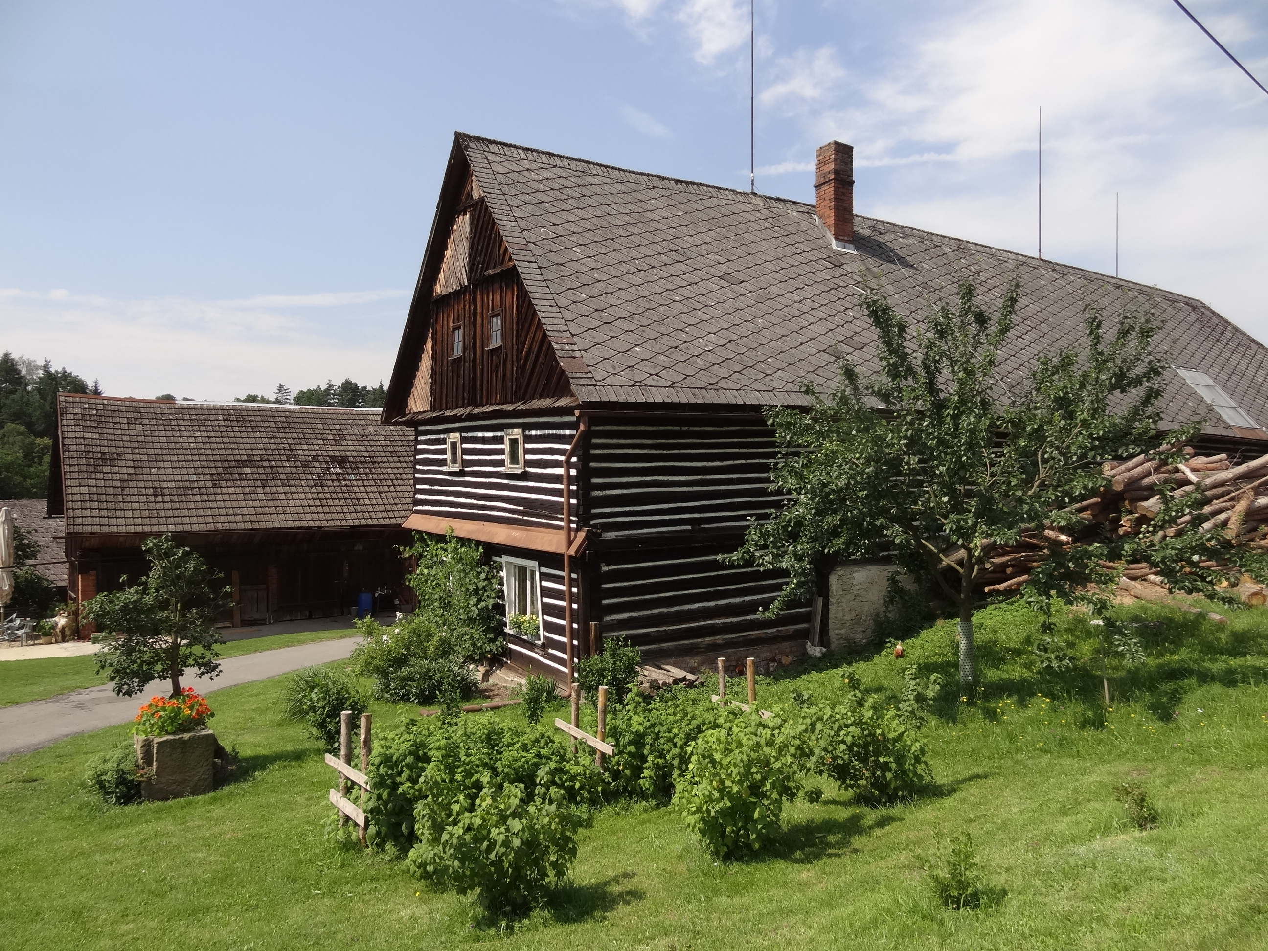 Dům čp. 5, Kohoutovice 5, severovýchodní část obce, Kohoutovice (Bílá).